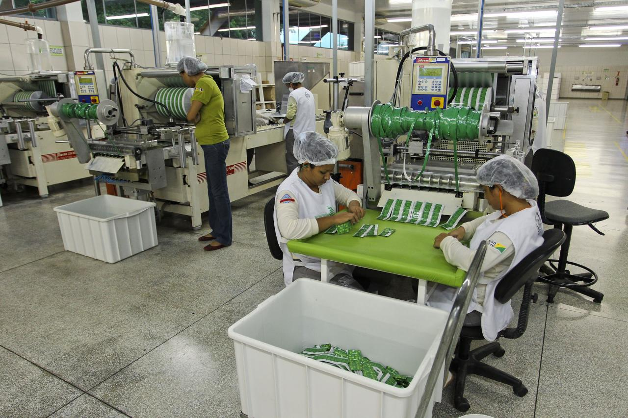 Xapuri (Acre) A Natex é resultado do projeto do governo do Acre de associar o uso sustentável da floresta amazônica às tecnologias de ponta para produção de preservativos masculinos, e está em funcionamento desde 2008, na cidade de Xapuri. É um departamento da Fundação de Tecnologia do Acre (Funtac), criada com recursos de um convênio entre governo do Estado e Ministério da Saúde e capacidade para produzir cerca de 100 milhões de camisinhas por ano. Toda a produção é absorvida pelo Ministério da Saúde, que destina o material aos programas de combate às DSTs. Atualmente, cerca de 700 famílias da Reserva Chico Mendes estão cadastradas para vender látex e pelo menos 500 permanecem em atividade”, conta o presidente da Funtac, Luiz Mesquita. Hoje existem cerca de 2.500 famílias na reserva. As famílias que colhem o látex podem levar a um dos 16 pontos de coleta cadastrados pela fábrica para vender o produto. Quatorze desses pontos estão dentro da própria reserva, facilitando a vida dos produtores Fotos: Gleilson Miranda/Secom